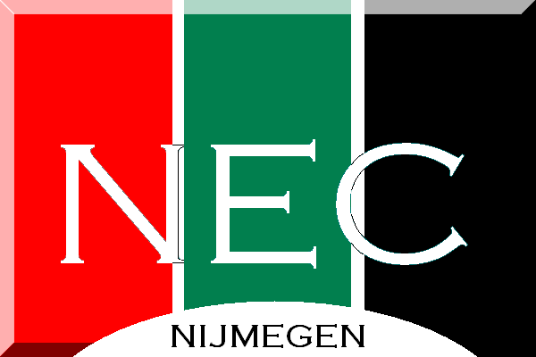 NEC Nijmegen fantasy flag